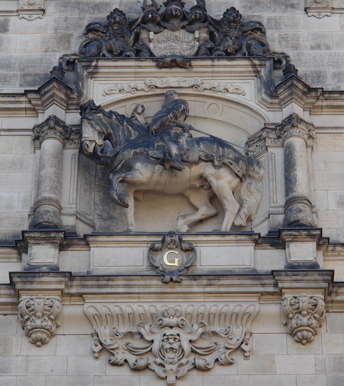 Reiterstandbild von Georg dem Bärtigen am Georgenbau Dresden